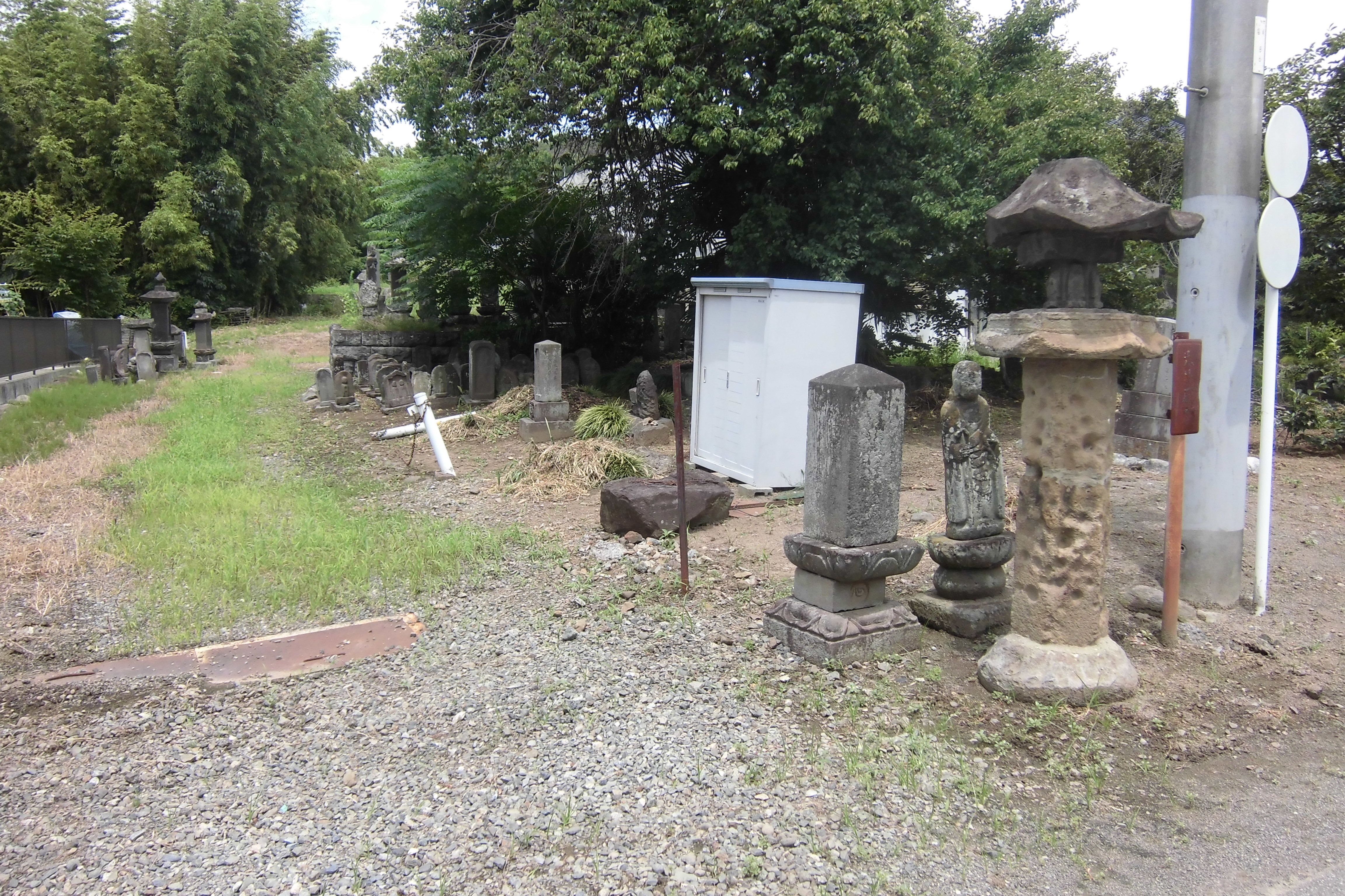 地蔵院跡（山梨県甲斐市志田）